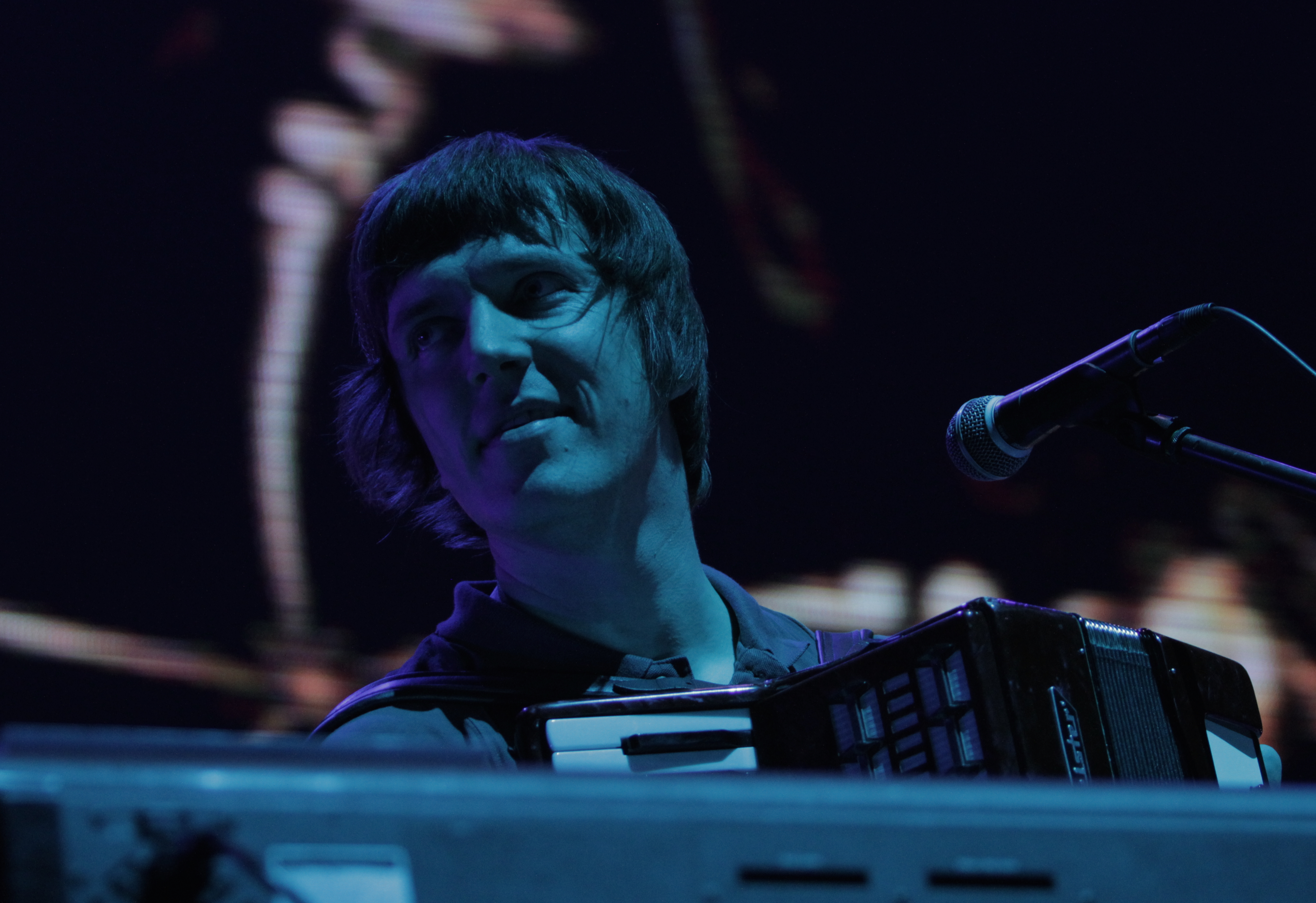 Prāta Vētras taustiņinstrumentālists Māris Mihelsons